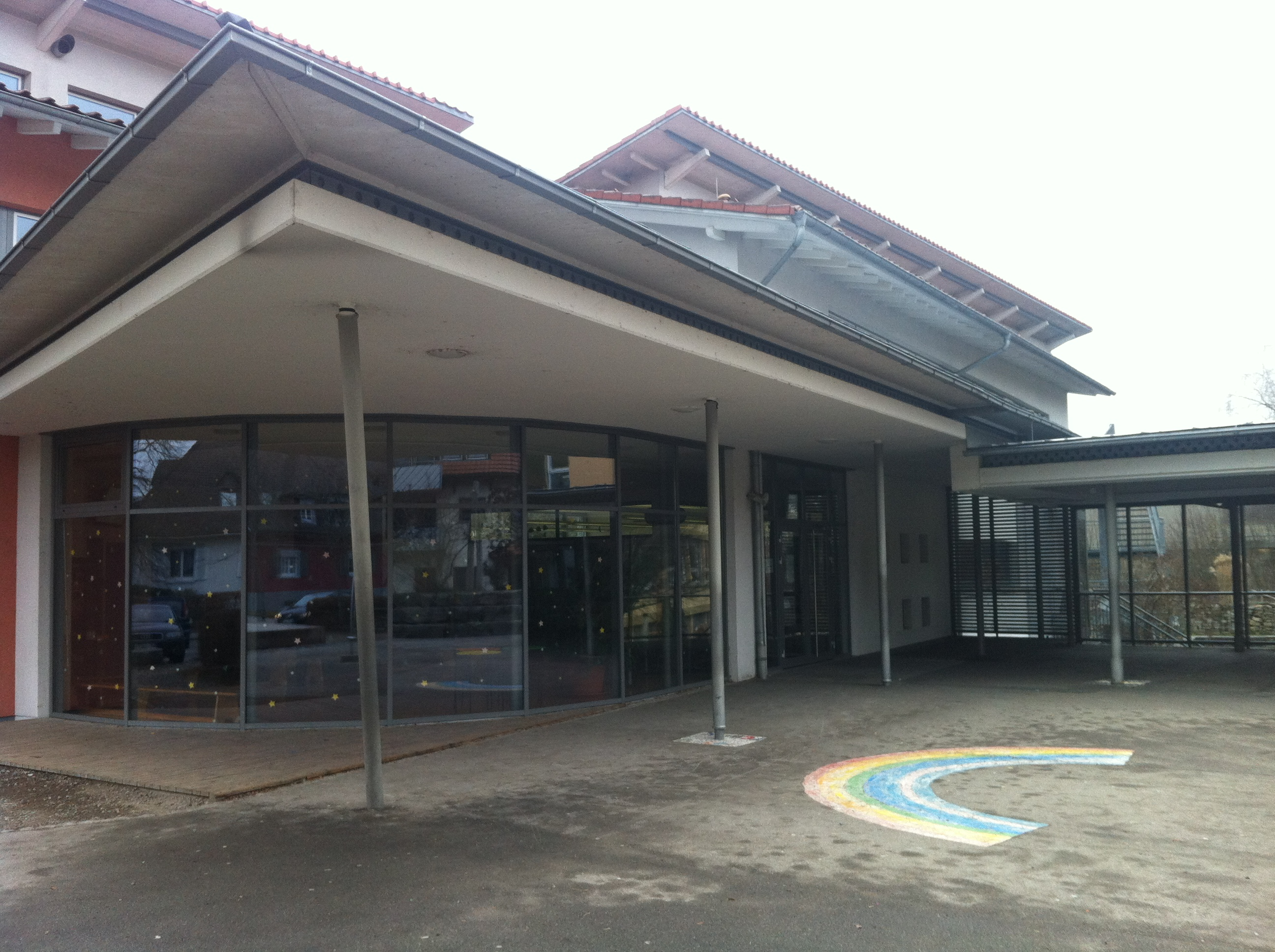 Grundschulgebäude der Alemannenschule (Klassen 3 und 4) in Wutöschingen im Landkreis Waldshut in Baden-Württemberg.